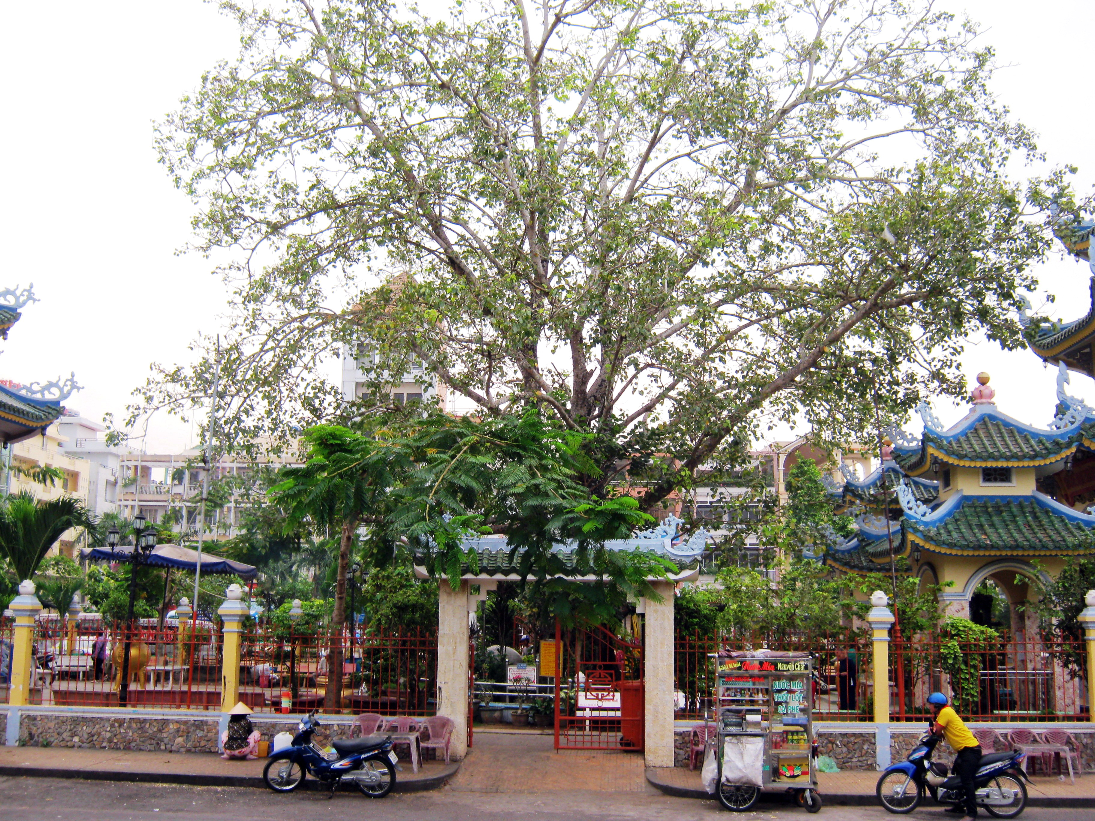 Bồ Đề Đạo Tràng (Châu Đốc) tọa lạc ở quảng trường trung tâm thuộc phường Châu Phú A, thị xã Châu Đốc, tỉnh An Giang, Việt Nam.